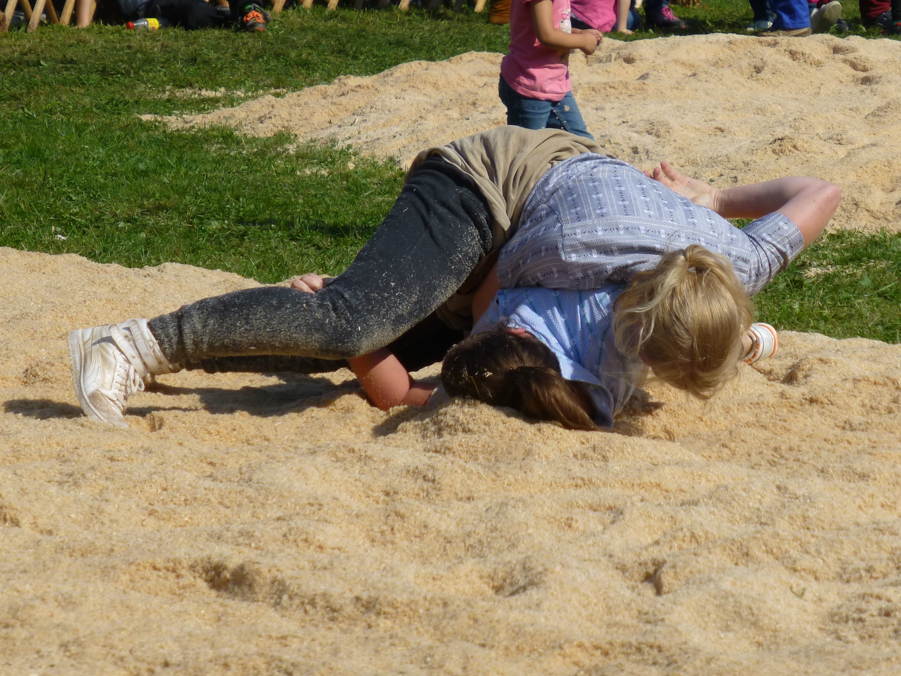 Frauenschwingen, Schweiz